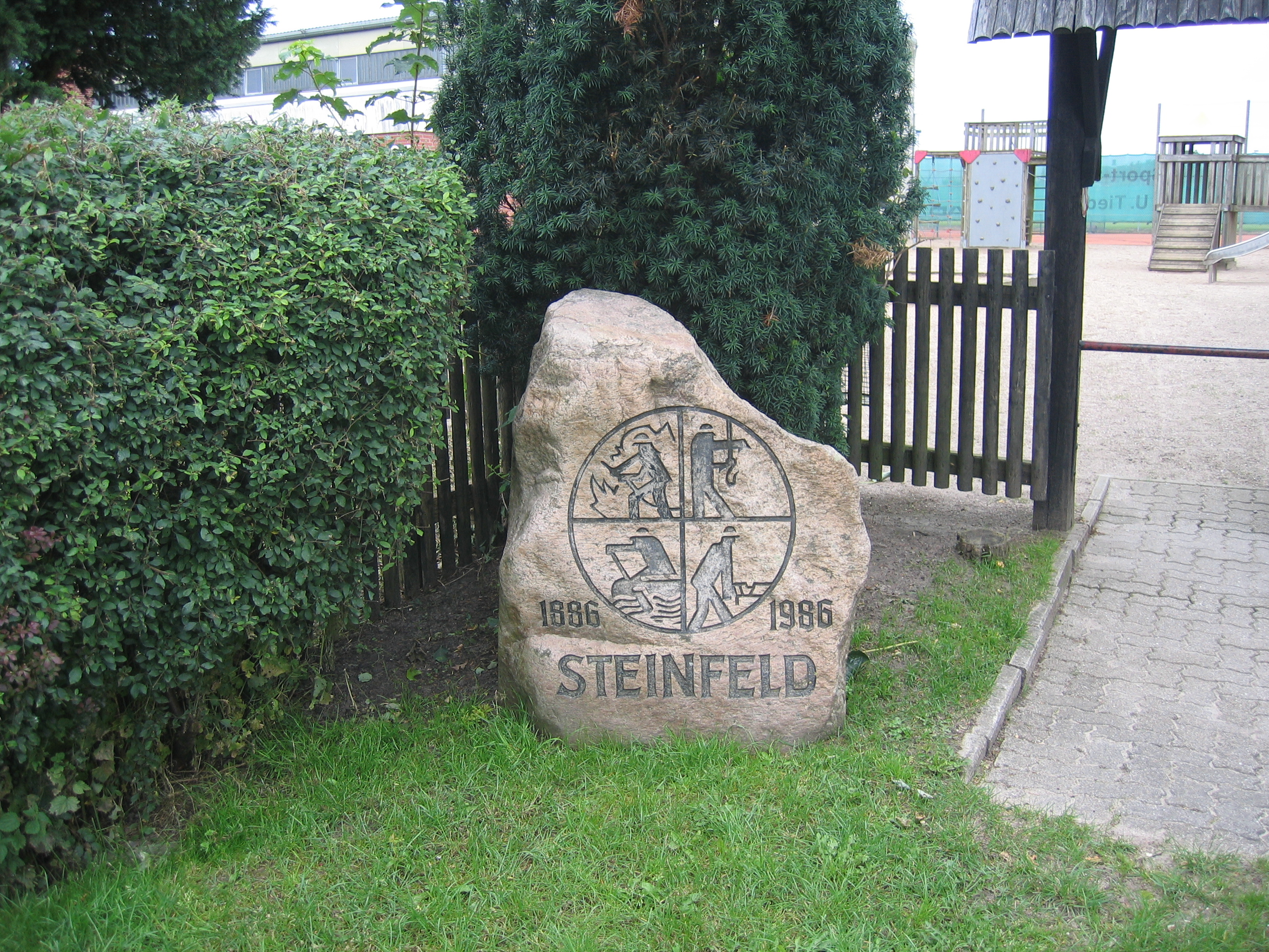 Steinfeld, Schleswig-Holstein, der Freiwillige Feuerwehr Stein